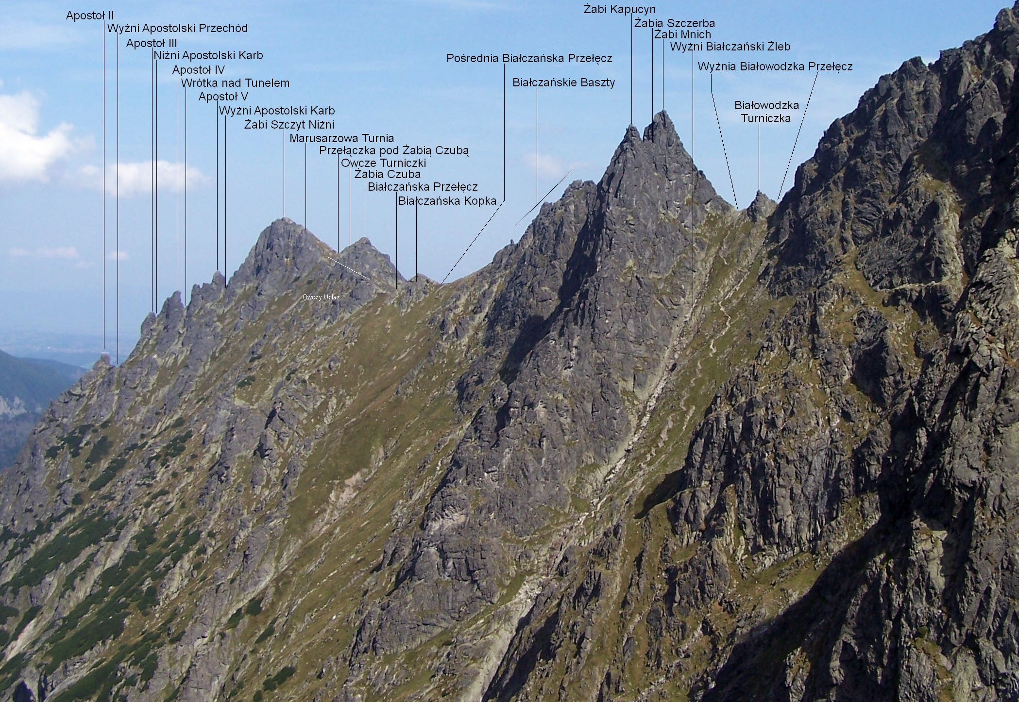 Widok z podejścia na Niżnie Rysy